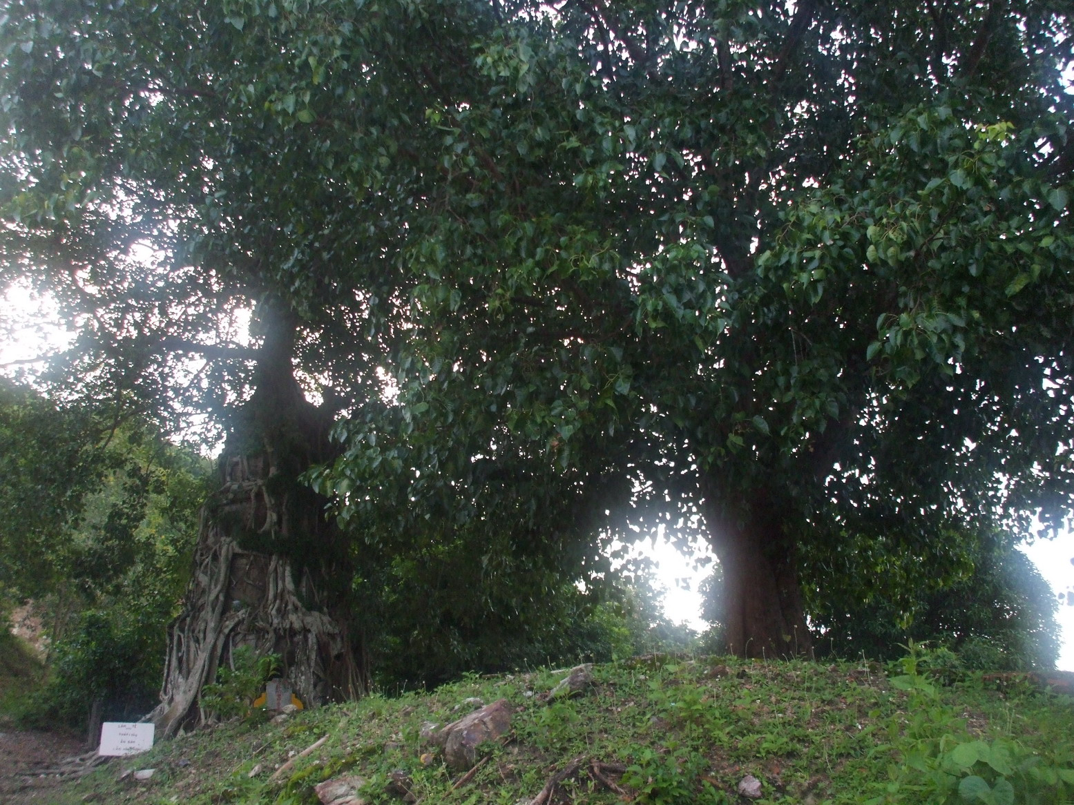 Nền chùa Phù Dung cũ tại Hà Tiên (Kiên Giang, Việt Nam). Nơi đây giờ chỉ còn ngôi tháp nhỏ 7 tầng của Hòa thượng Ấn Đàm, mất khoảng 1662. Ngôi tháp này sở dĩ còn tồn tại cho đến ngày nay là nhờ bộ rễ của một cây bồ đề ôm trùm lên nó.